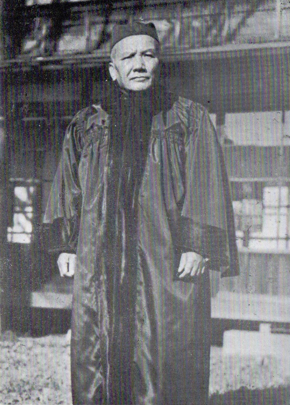 1936年きよめ教会終身監督中田重治の晩年